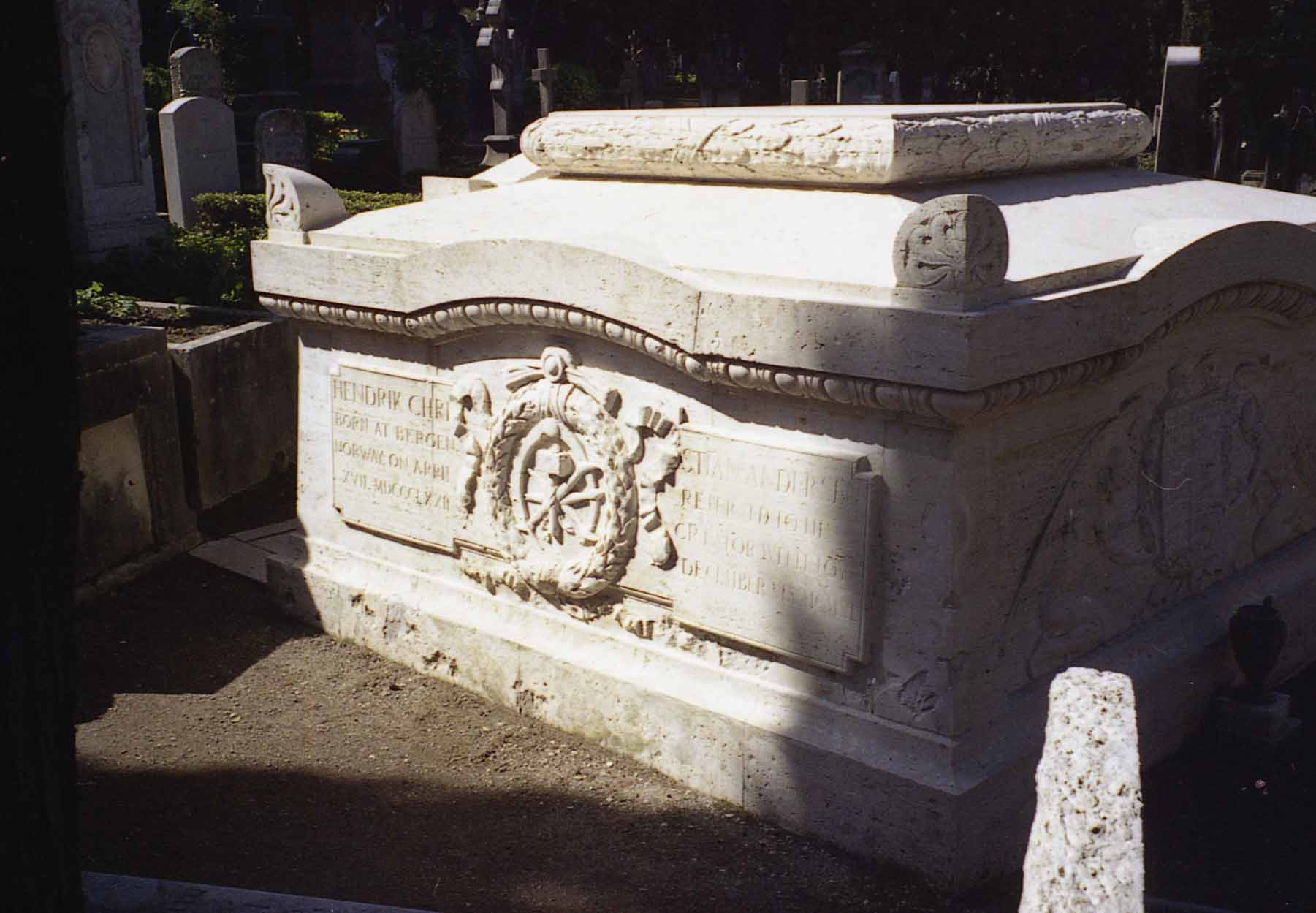 Tomba dello scultore Hendrik Andersen (1872-1940) al al Cimitero acattolico di Roma.